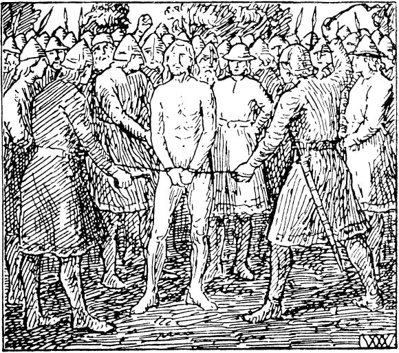 Wilhelm Wetlesen: Illustration for Haraldsønnenes saga (Inges saga), Heimskringla 1899-edition. nn: «Dei hudflengjer Sigurd Slembe.»